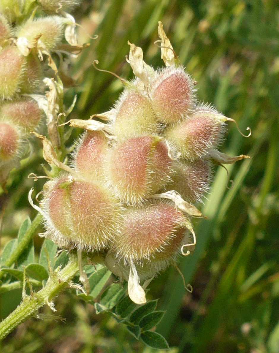 Астрагал нутовый. Экопоселение Кореньские родники, Белгородская область.